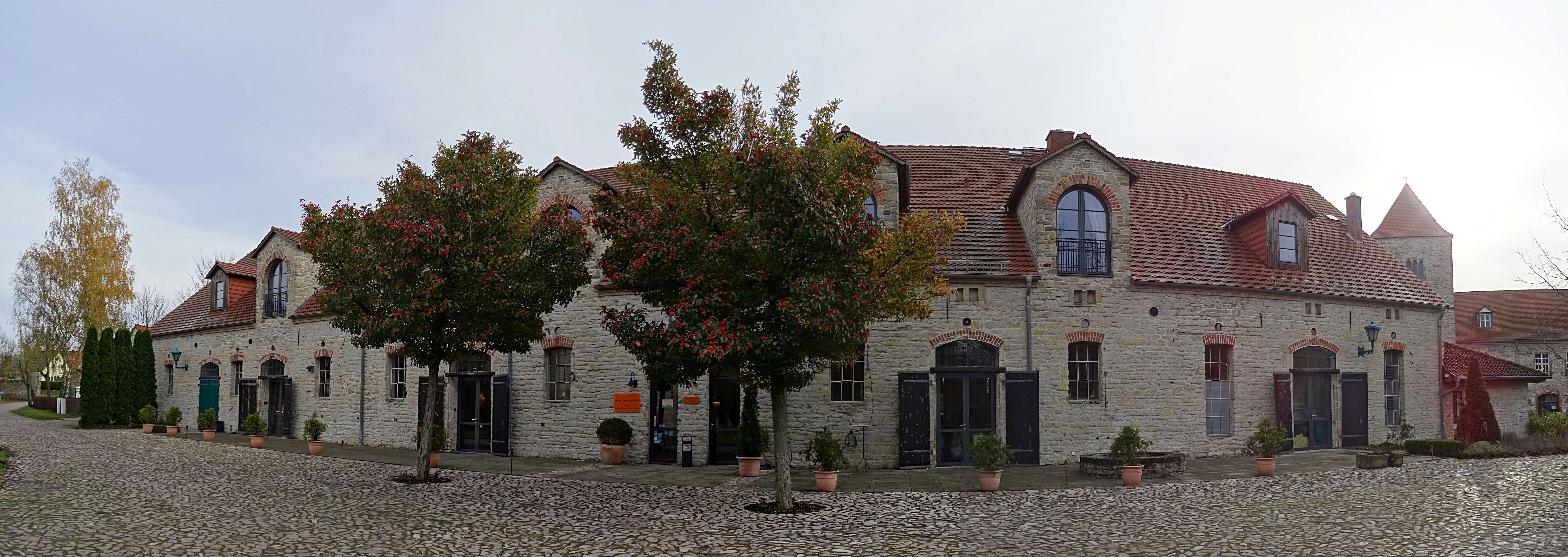 Burg Wanzleben